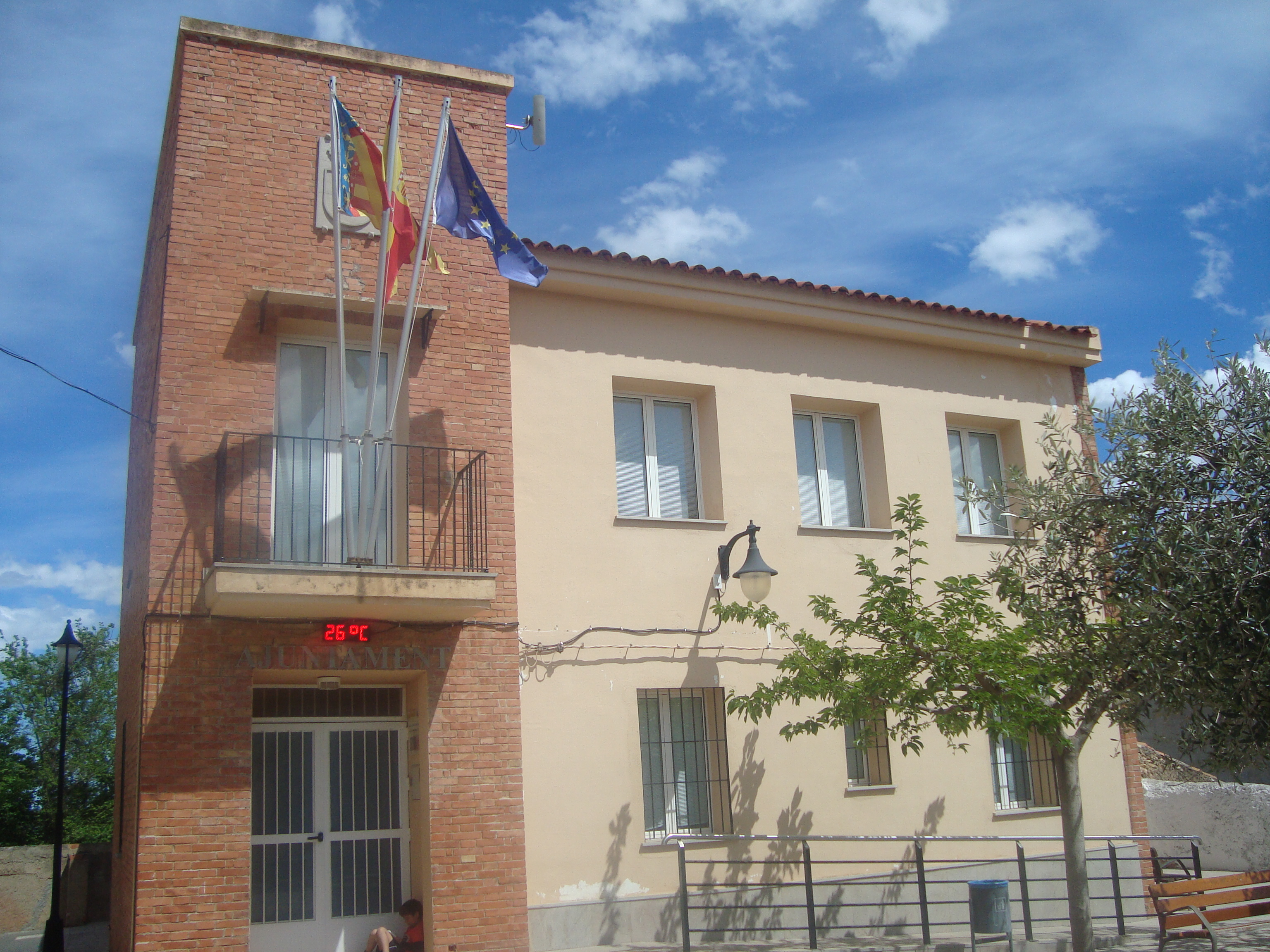 Ayuntamiento de la Torre d'en Doménec (Castellón)